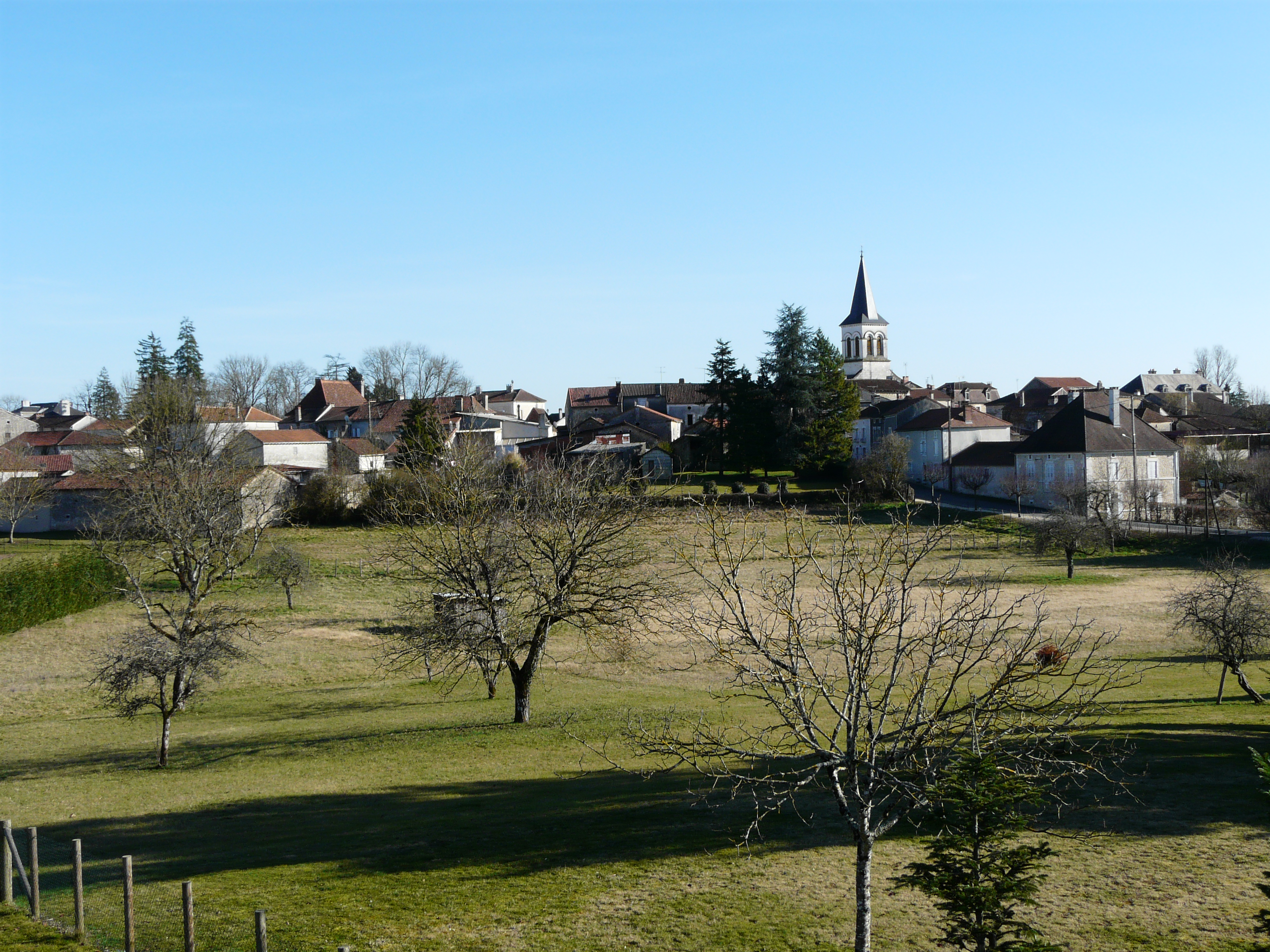 Le bourg de Négrondes vu depuis le nord-ouest, Dordogne, France